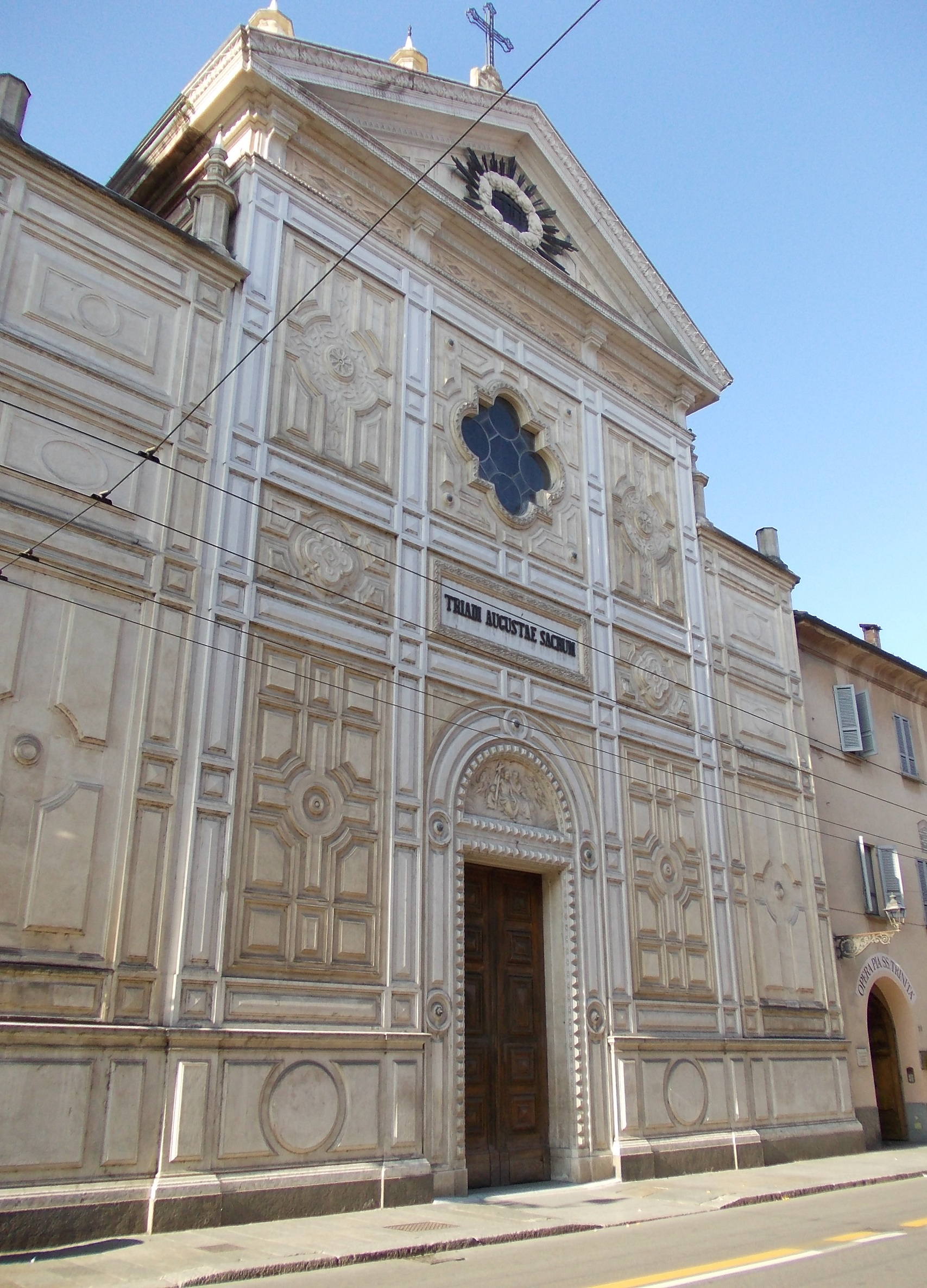 La chiesa di Santa Teresa del Bambin Gesù, detta Oratorio dei Rossi, a Parma